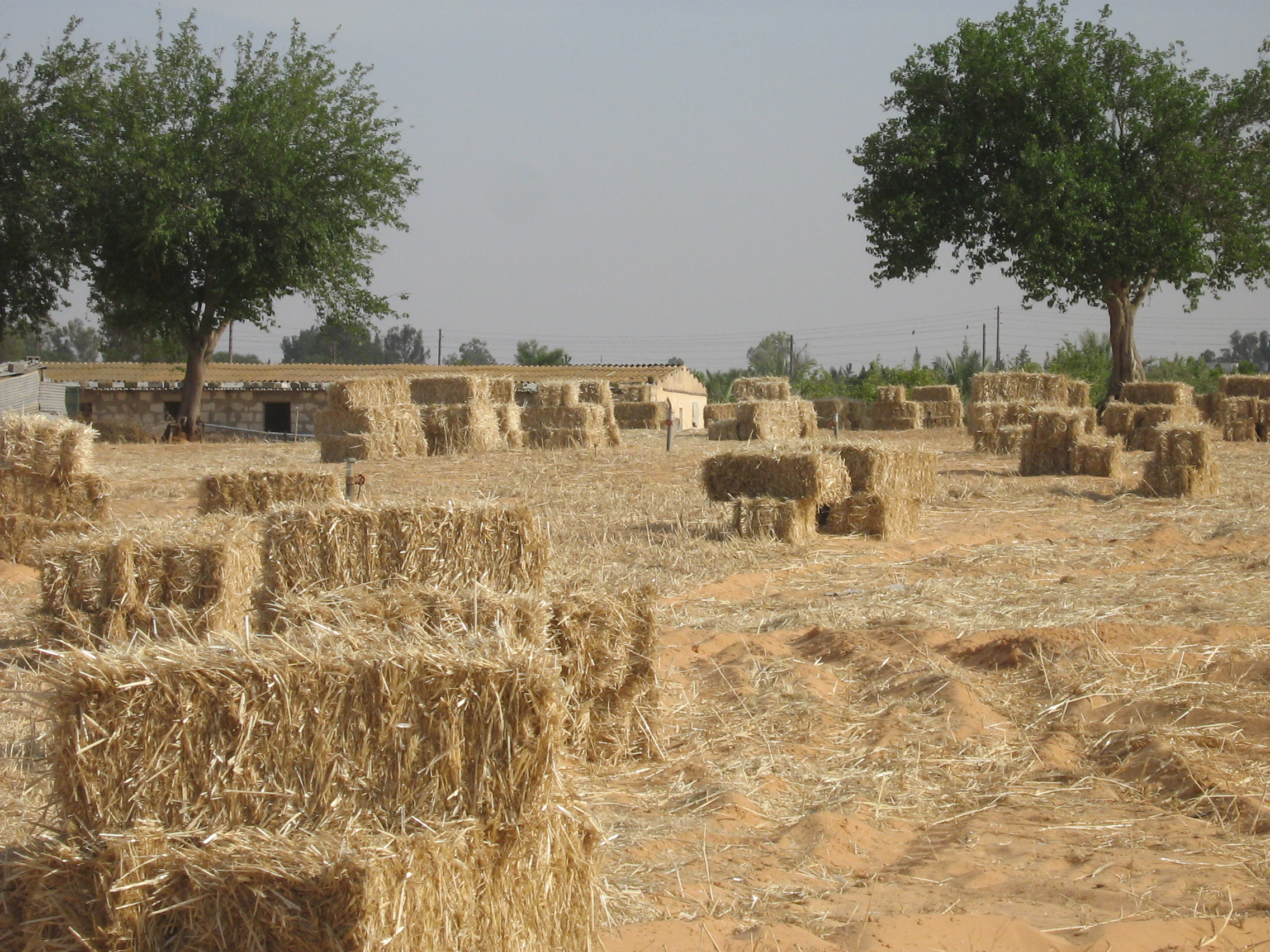 Убраное поле в Бенгашире вблизи Триполи.